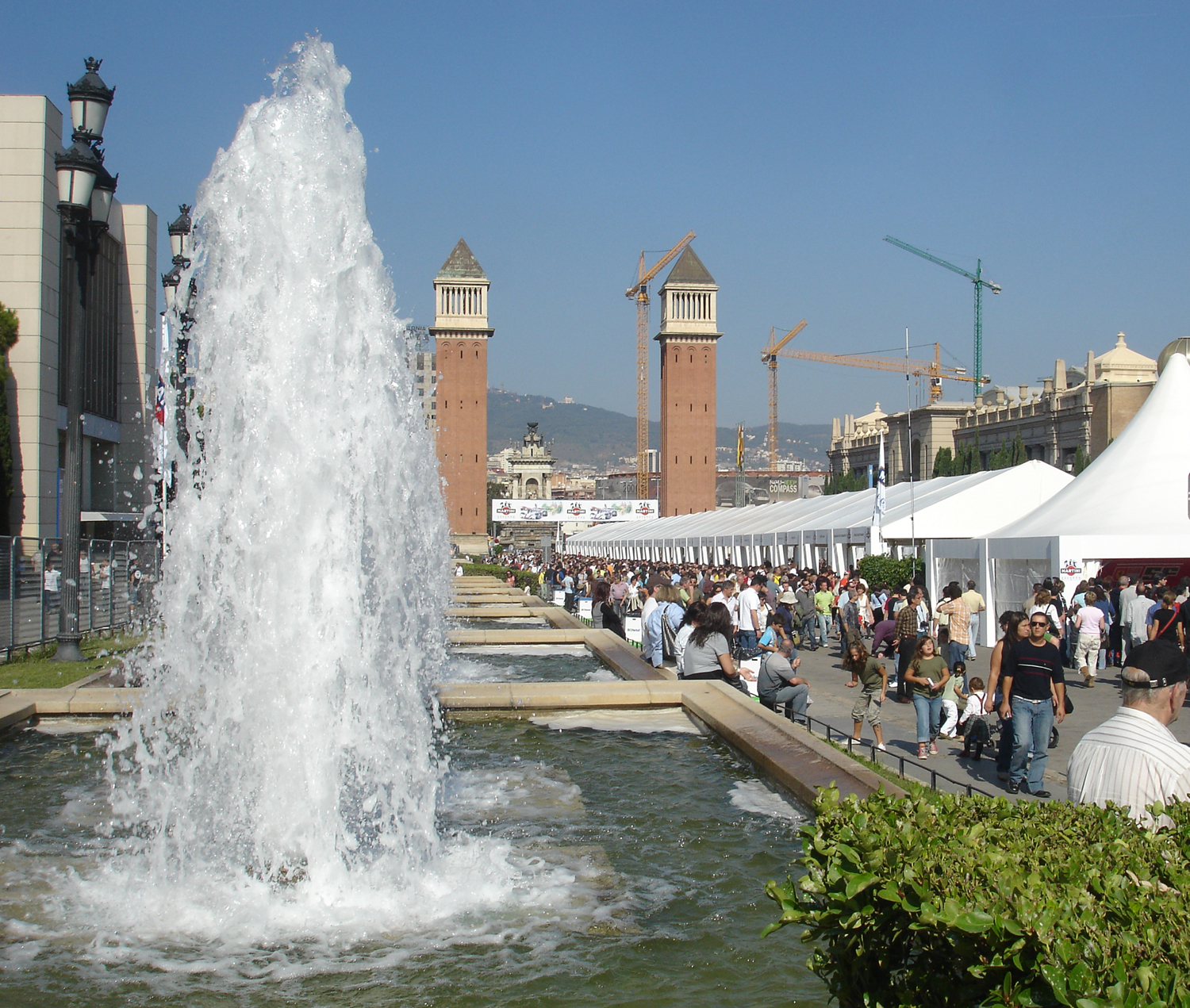 Martini Legends: Festival de commemoració del 75 aniversari del Circuit de Montjuïc